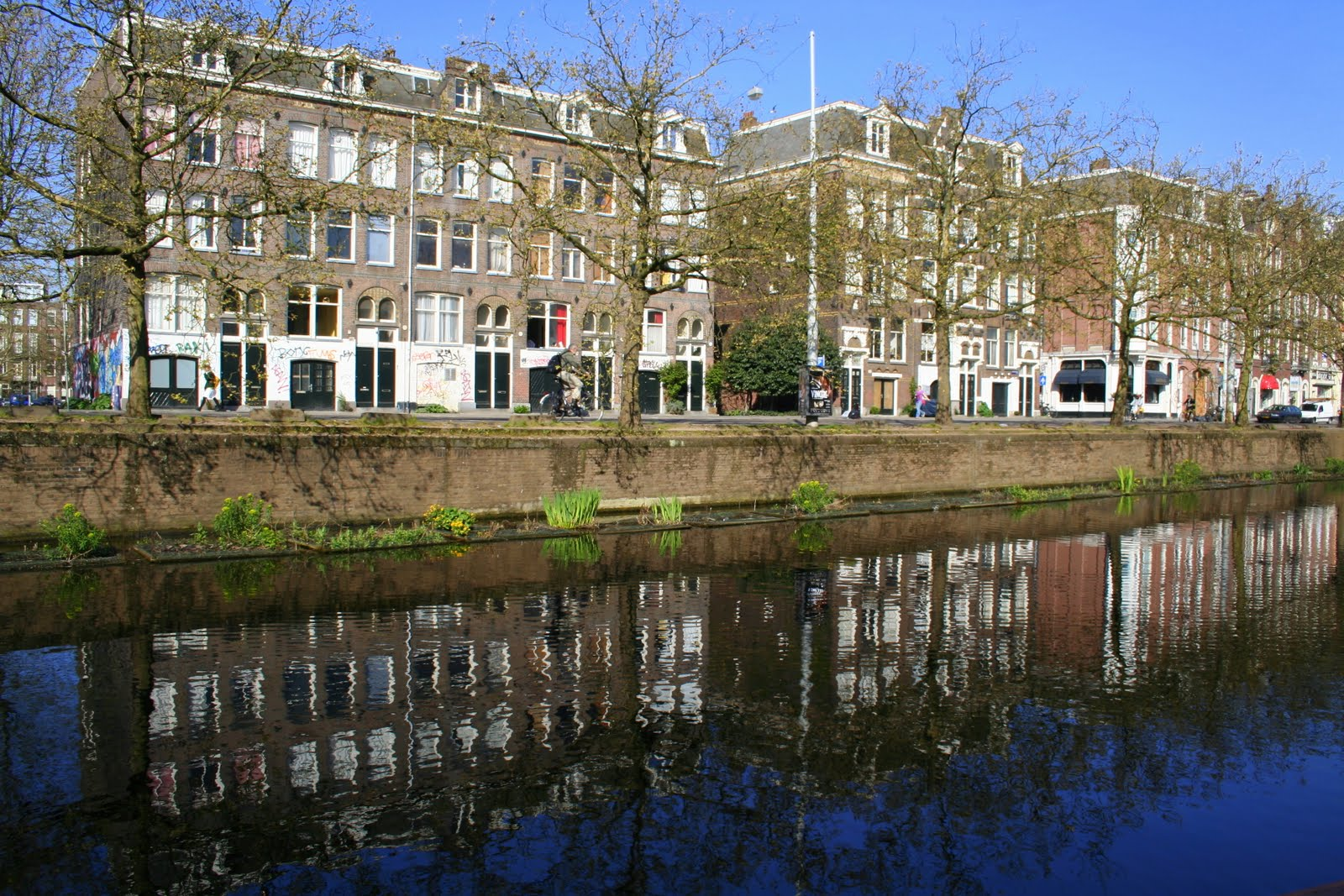 Groenmarkt Amsterdam, voormalige groente- en fruitmarkt, met op de begane grond opslag voor de handkarren van de marktlieden